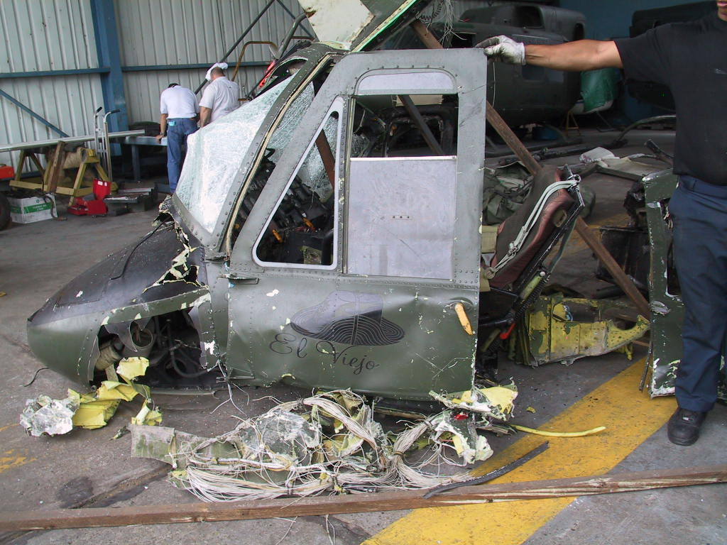 Resultado del helicoptero después del accidente en Ciudad de Panamá donde falleció el General de Carabineros José Bernales